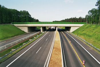 Grünbrücke über die Autobahn A 52 bei Elmpt, an der Deutsch-Niederländischen Grenze Nähe Roermond